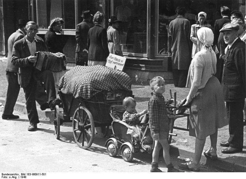 Nordwestdeutschland, vertriebene Familie ADN-ZB/dpd Westdeutschland 1948: Mit Frau, Kind und Kegel zieht dieser Mann über die Strassen Nordwestdeutschlands. Ein paar Töne aus der Ziehharmonika locken die Mitleidigen herbei, die sich zu einer Spende bereitfinden. 1931-48